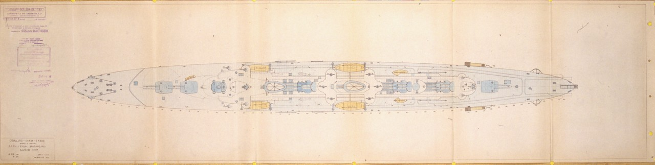 Pianta dell'esploratore veloce "Tashkent", costruito dal Cantiere Odero Terni Orlando di Livorno per la Marina Militare Sovietica, 1936 (AS Livorno, Archivio storico del Cantiere navale Luigi Orlando, 8 febbraio 1936)